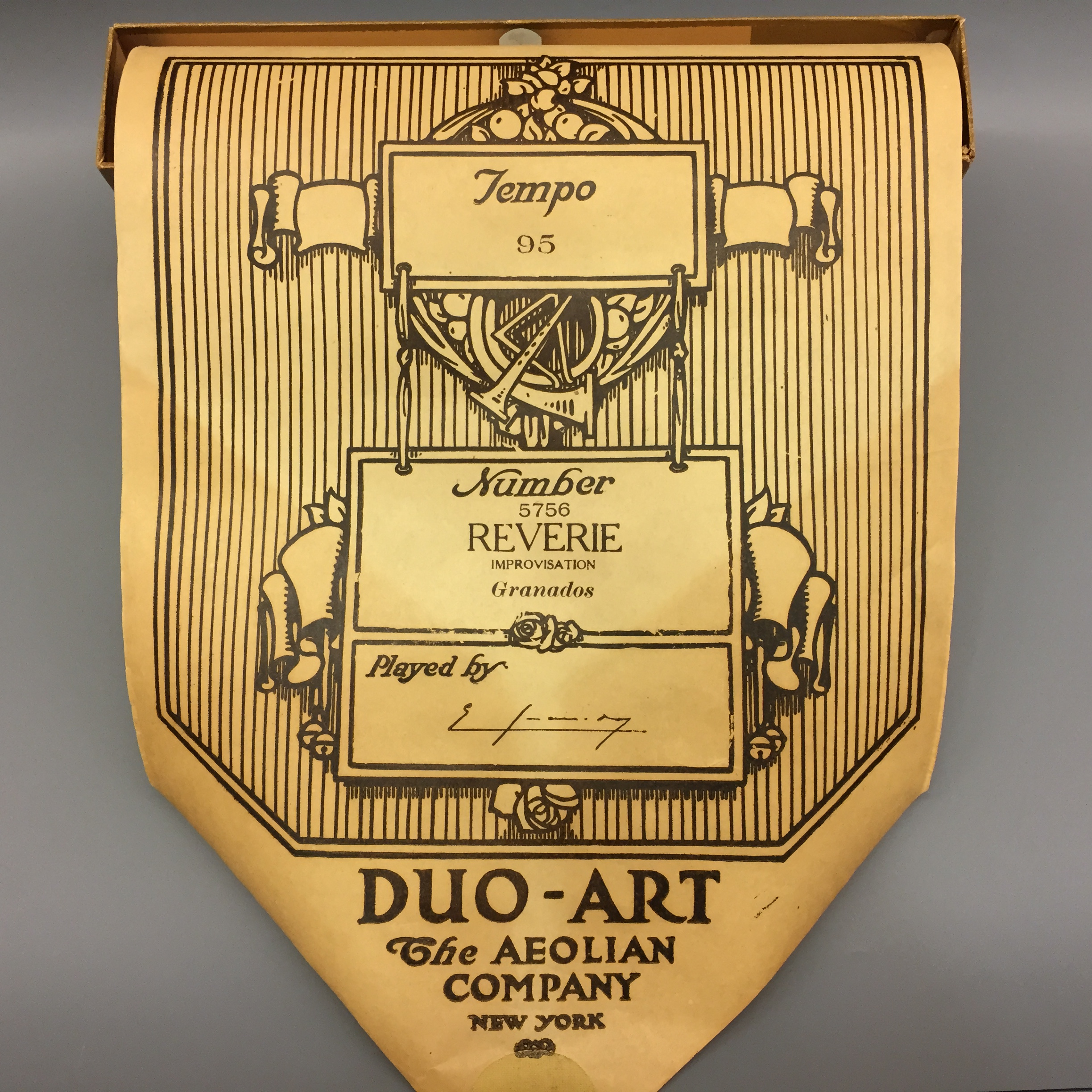 Réverie, Enric Granados, Duo-Art artist roll